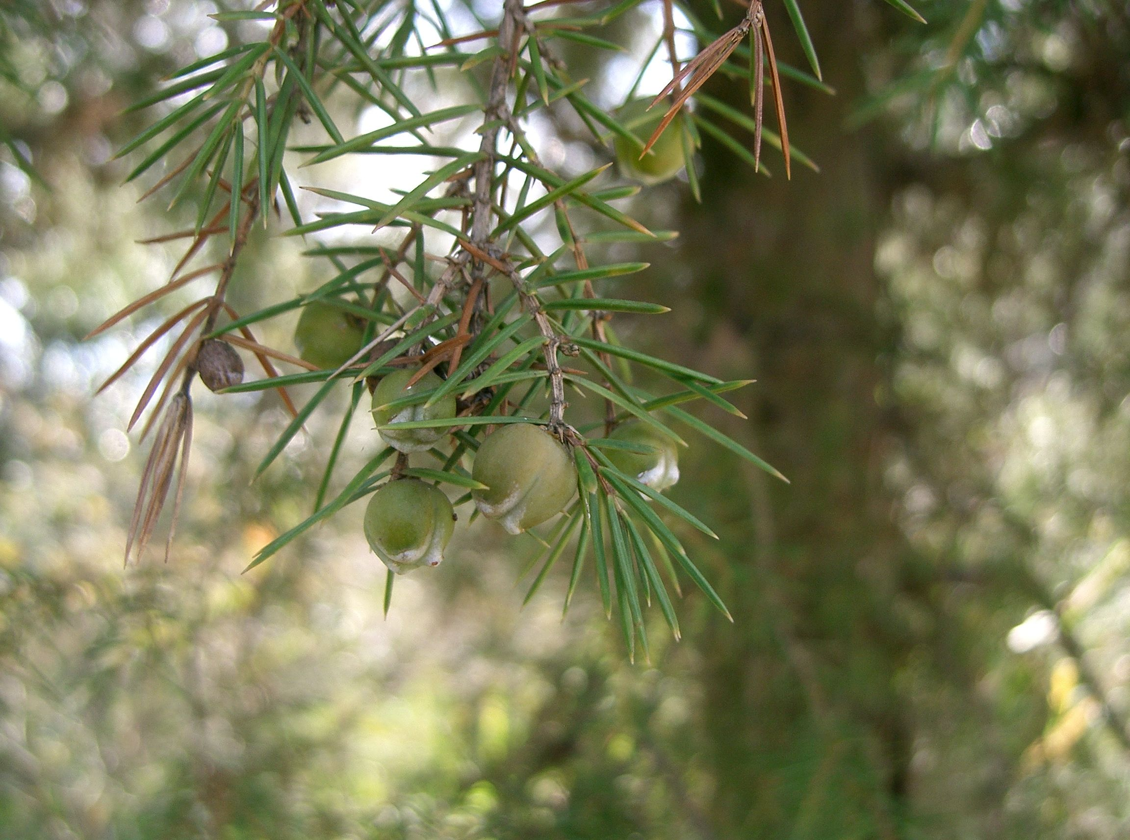 Juniperus rigida